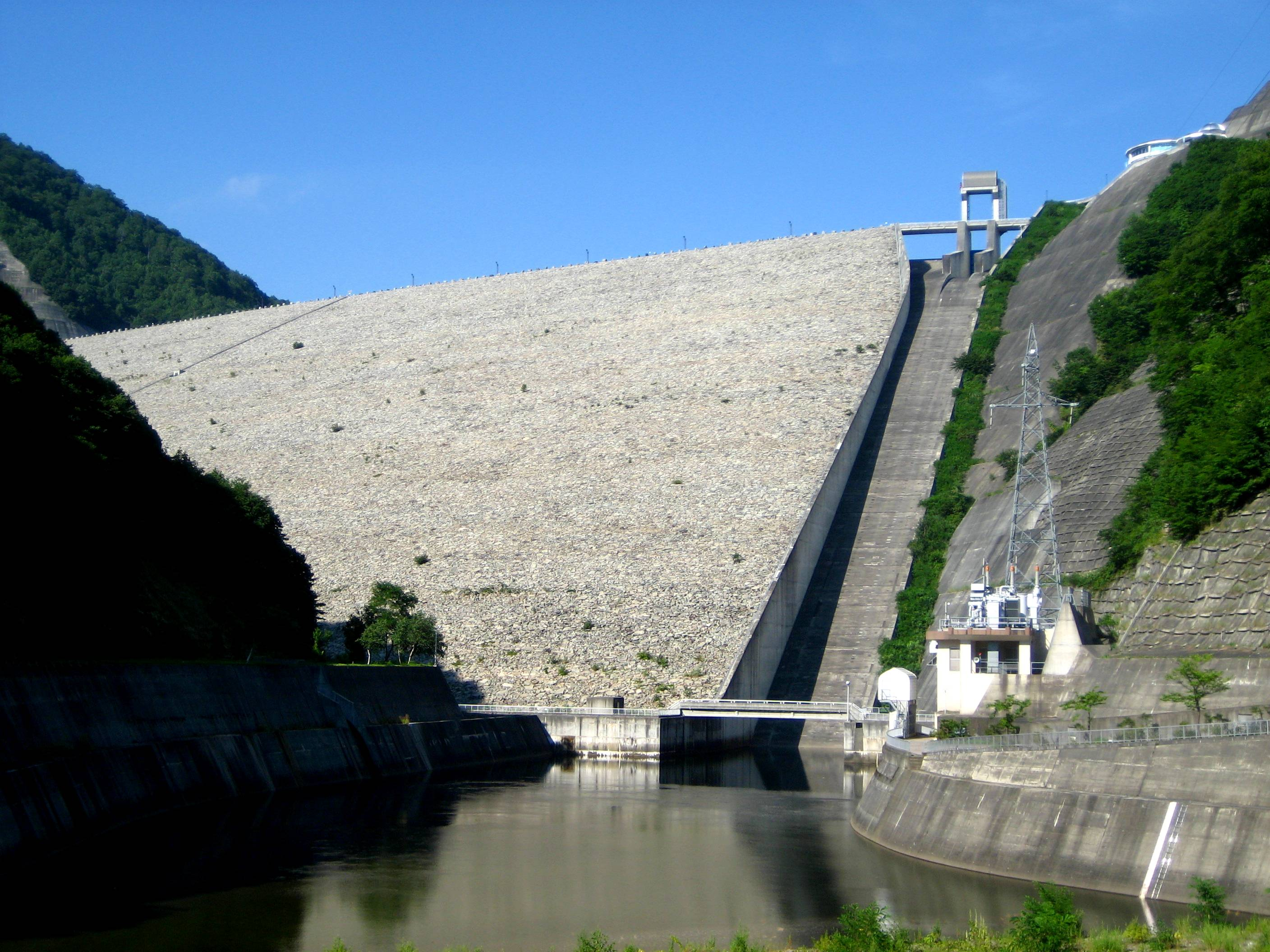 Naramata Dam (奈良俣ダム) in Minakami, Gunma, Japan.